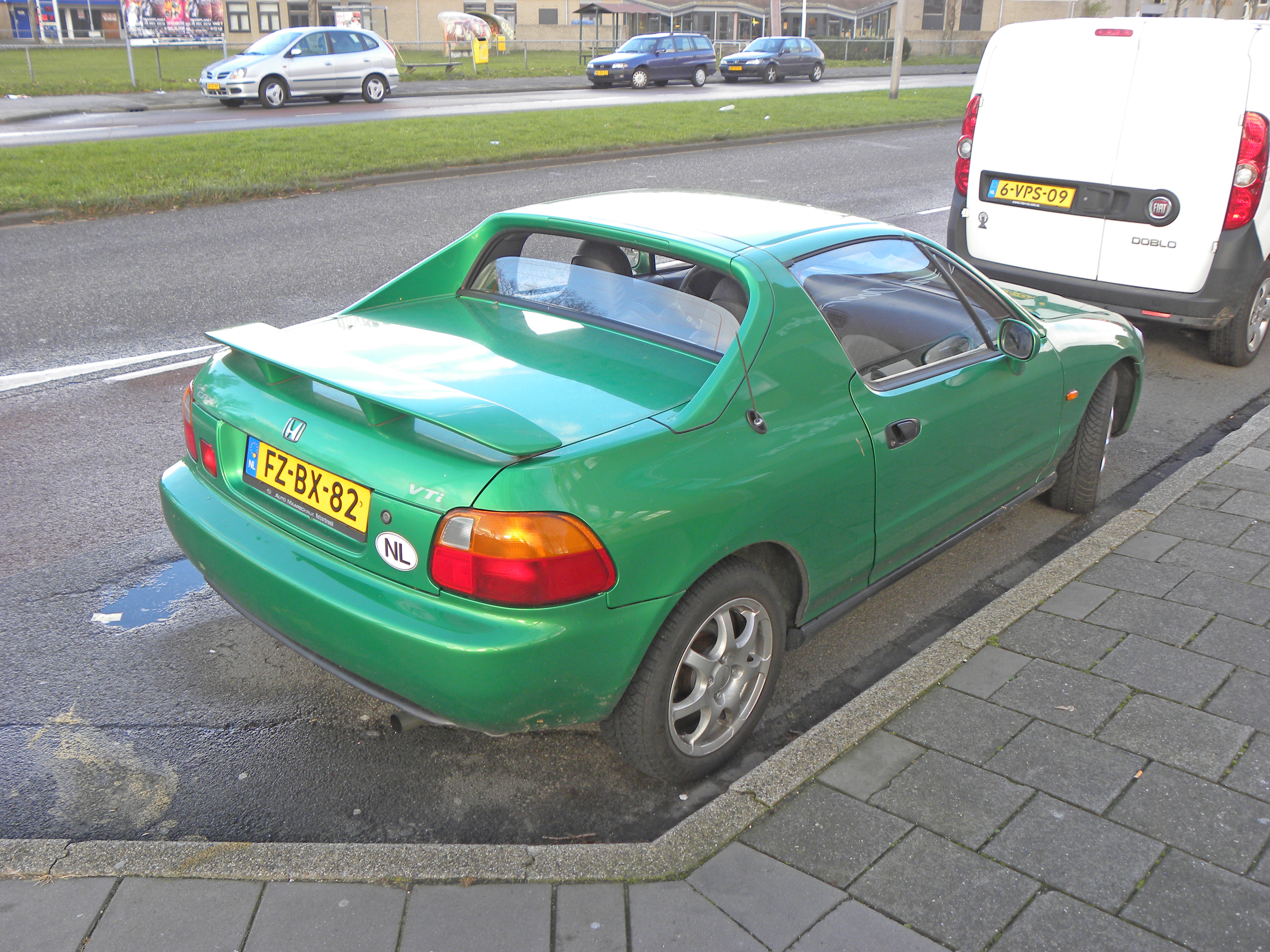 1992 Honda CRX VTI-E